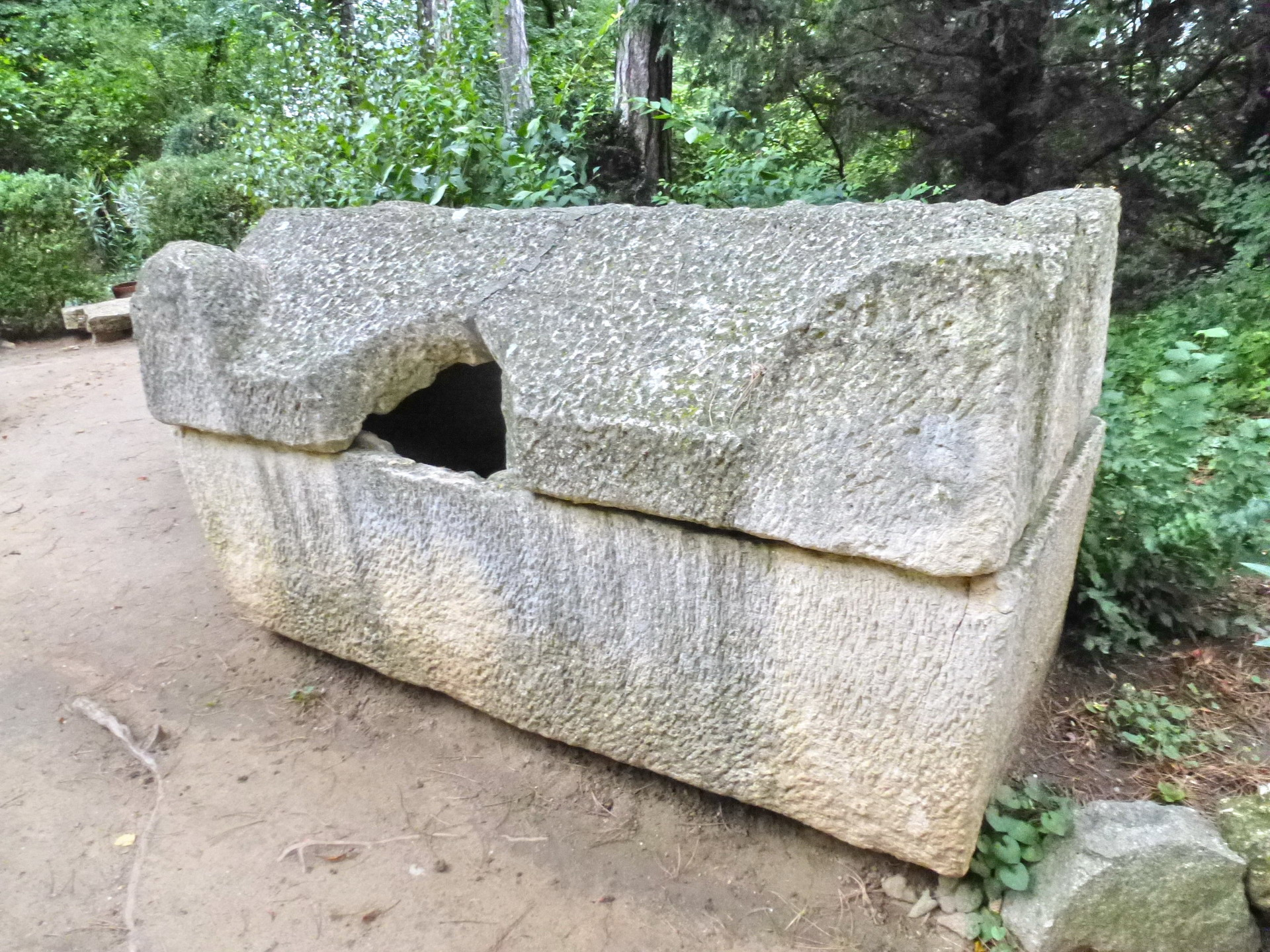 Cluj-Napoca, Grădina Botanică, Grădina Romană, vestigii romane (sarcofagul nr.1)